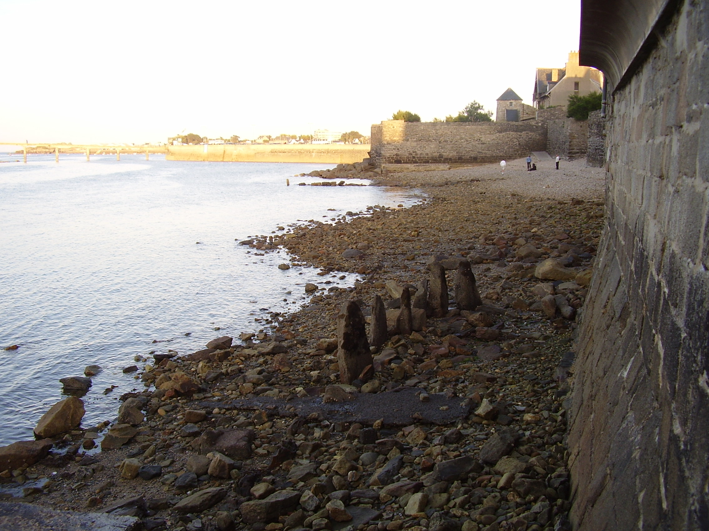 Roscoff, Bretagne; Frankreich